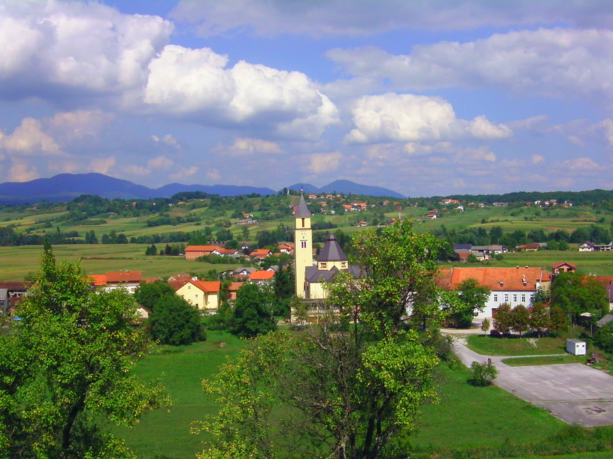 Blick auf Krasic